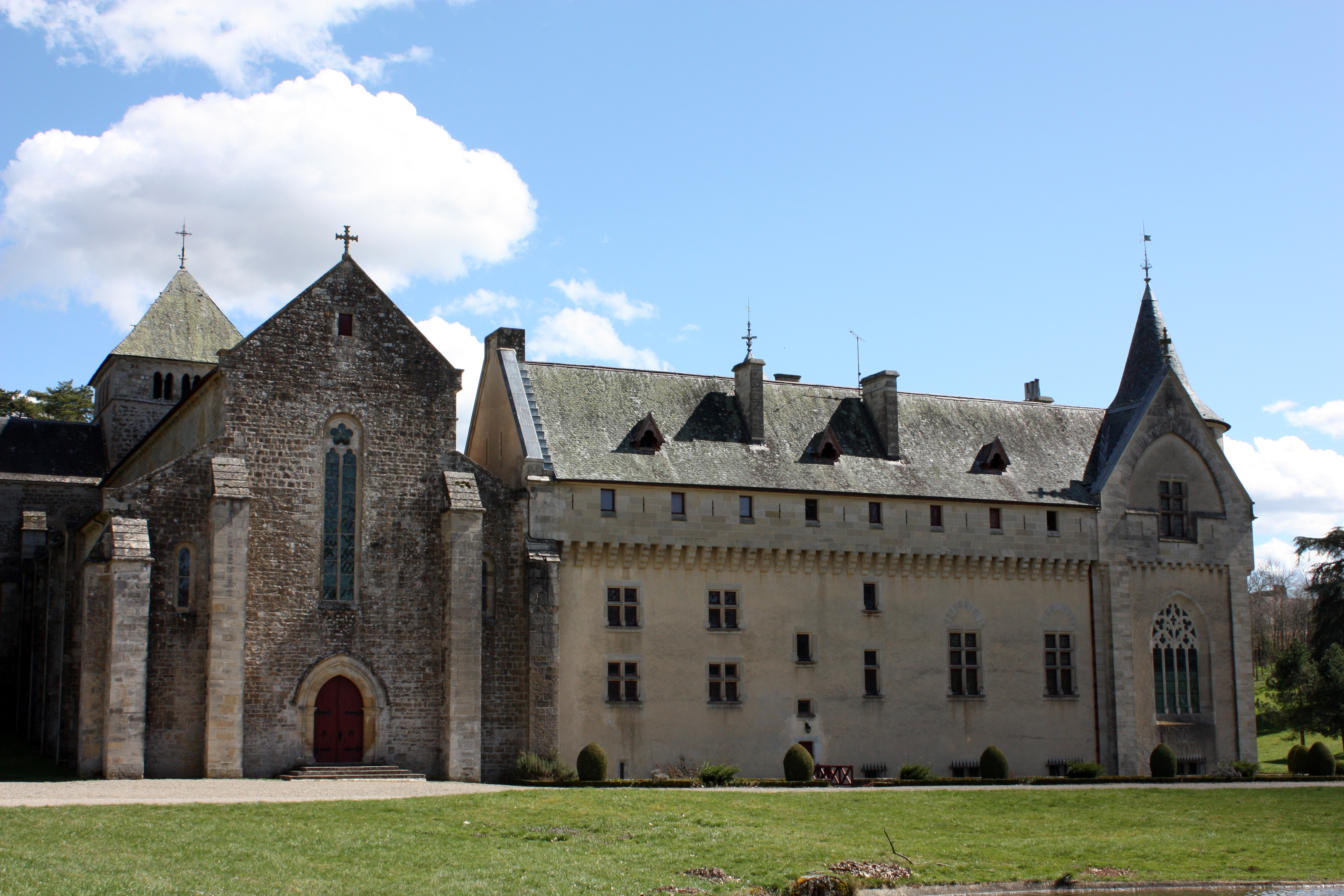 Loc-Dieu Abbey - Nord West face.